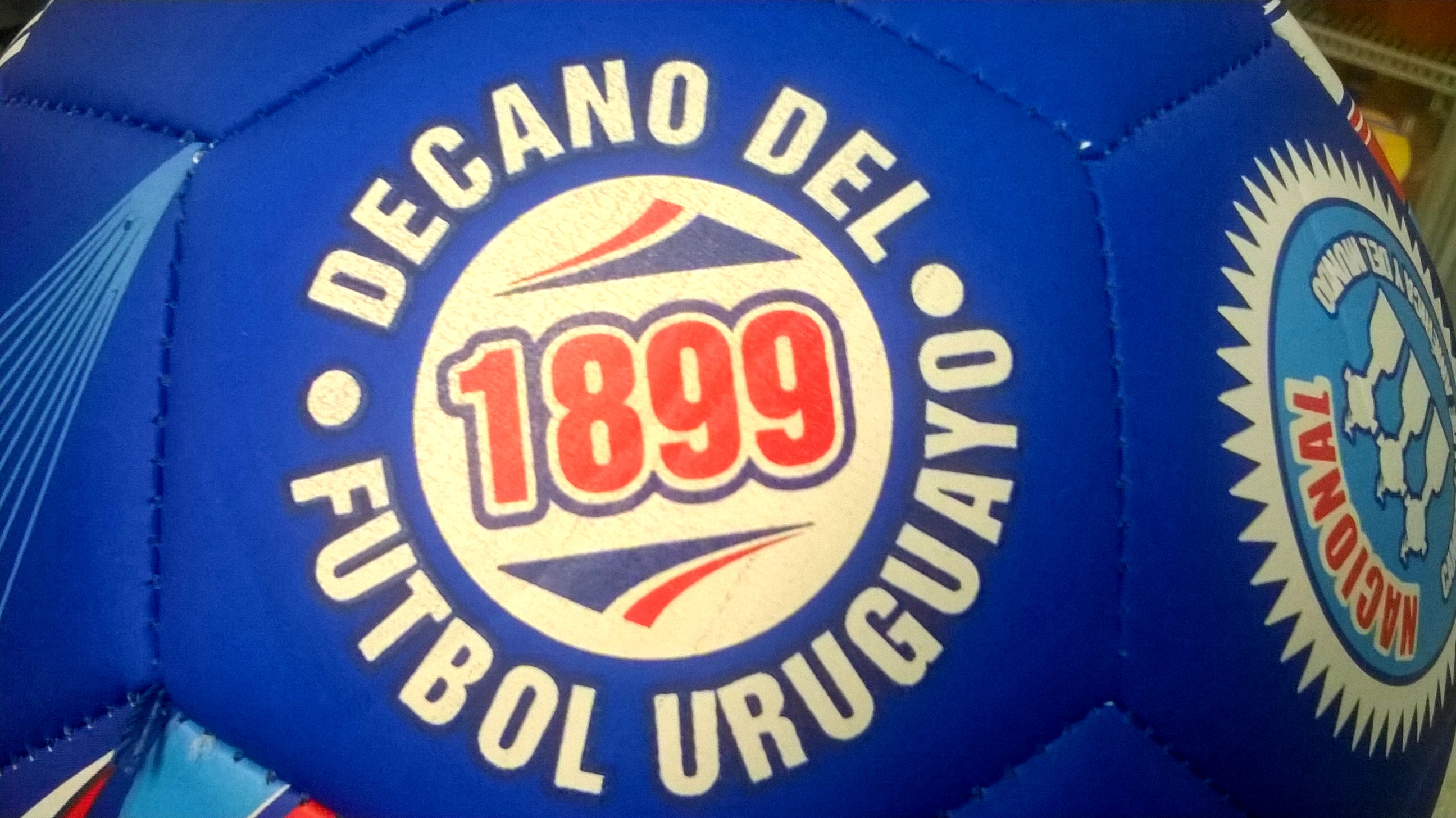 Pelota de Nacional